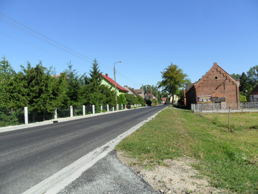 Czarnowice